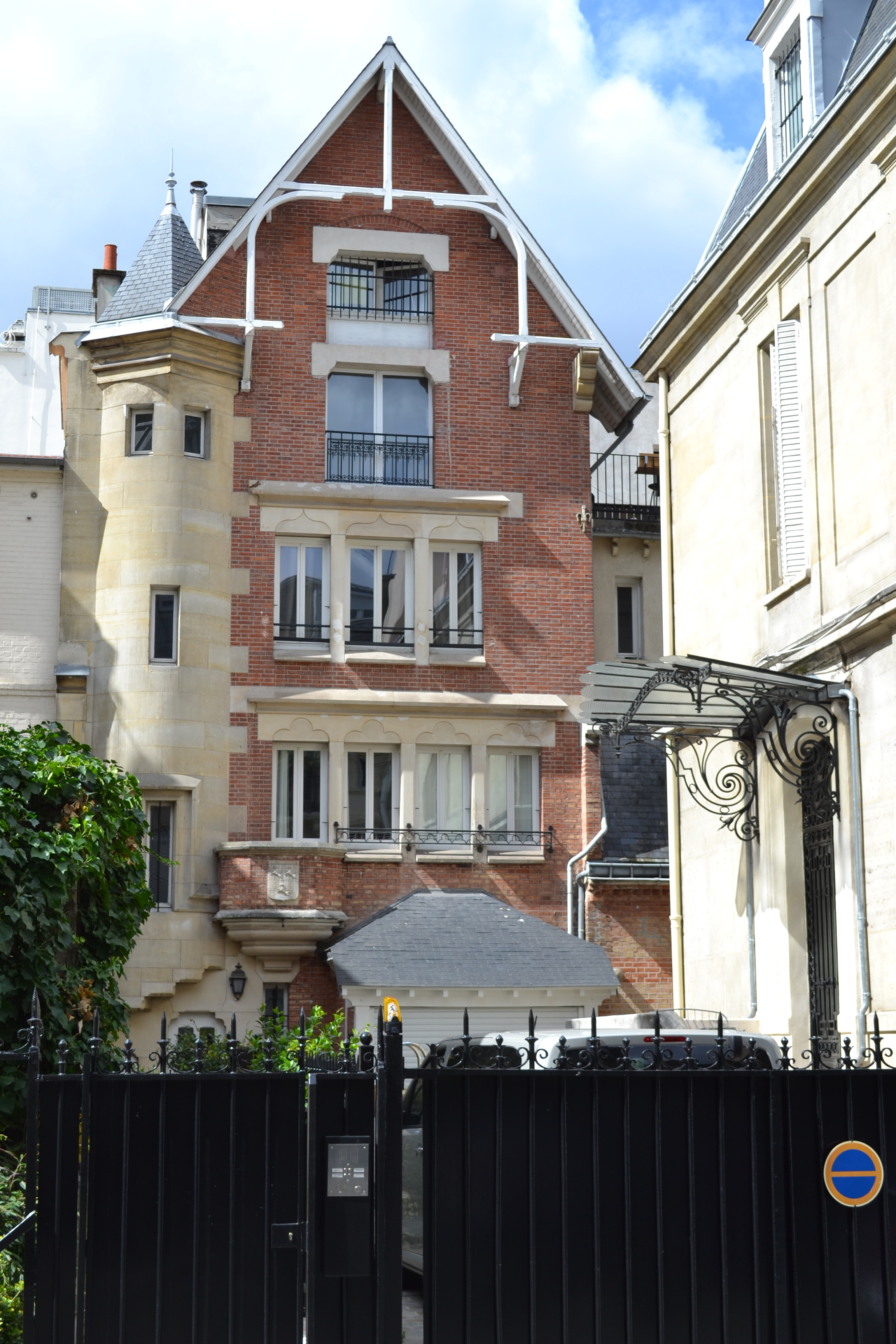 Maison sise au n° 19 de la rue Weber, Paris (16e).